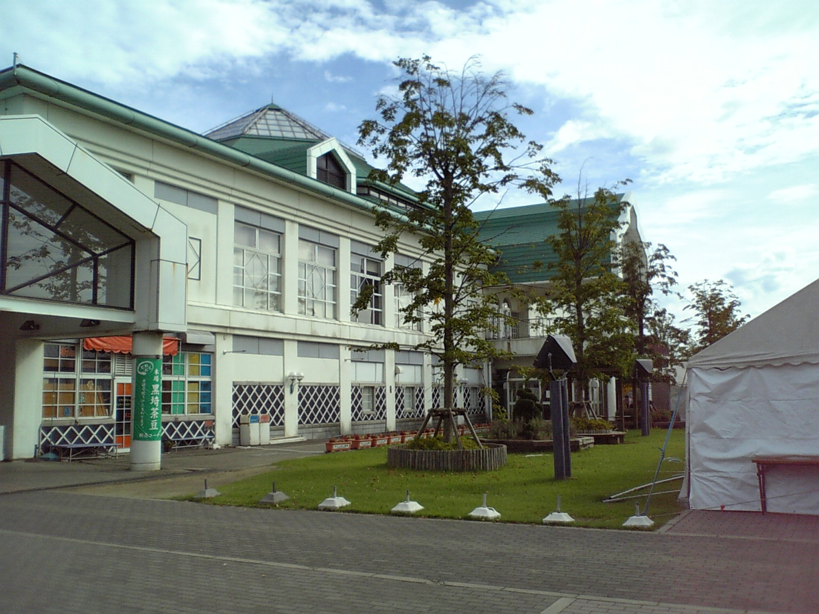 道の駅新潟ふるさと村。